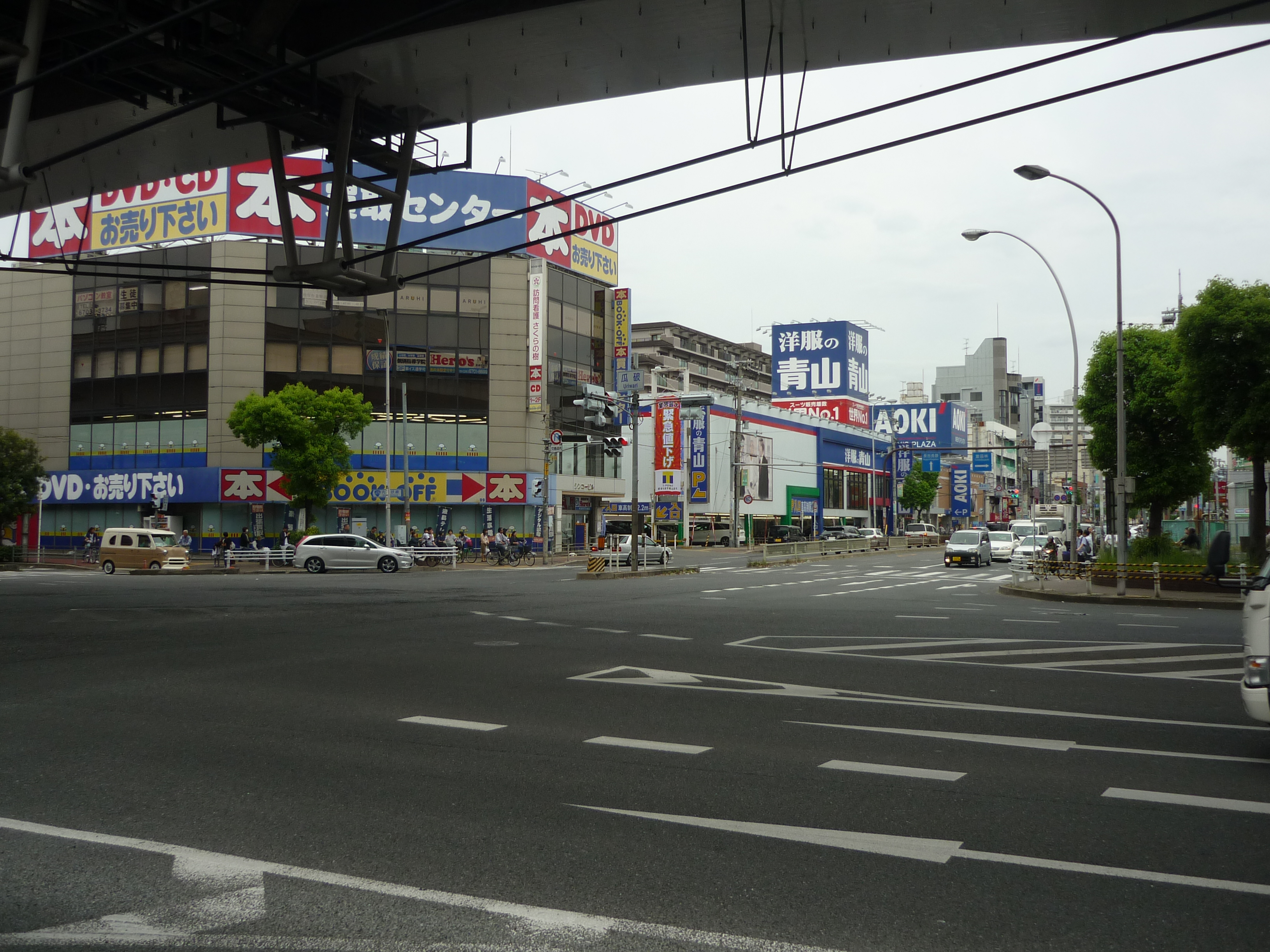 瓜破交差点（長居公園通り）